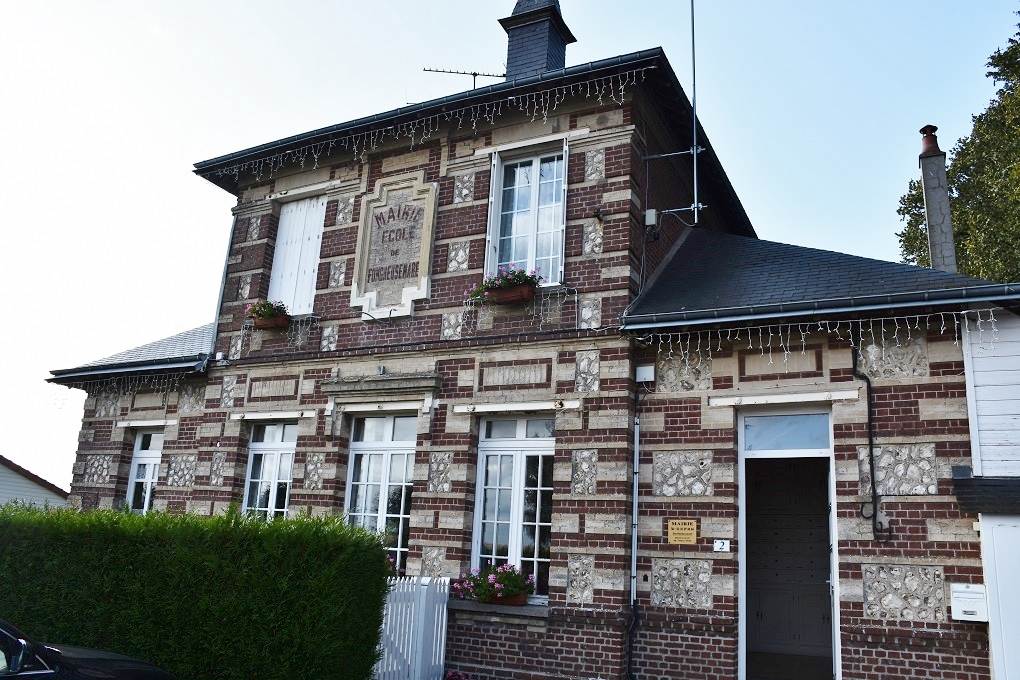 la Mairie